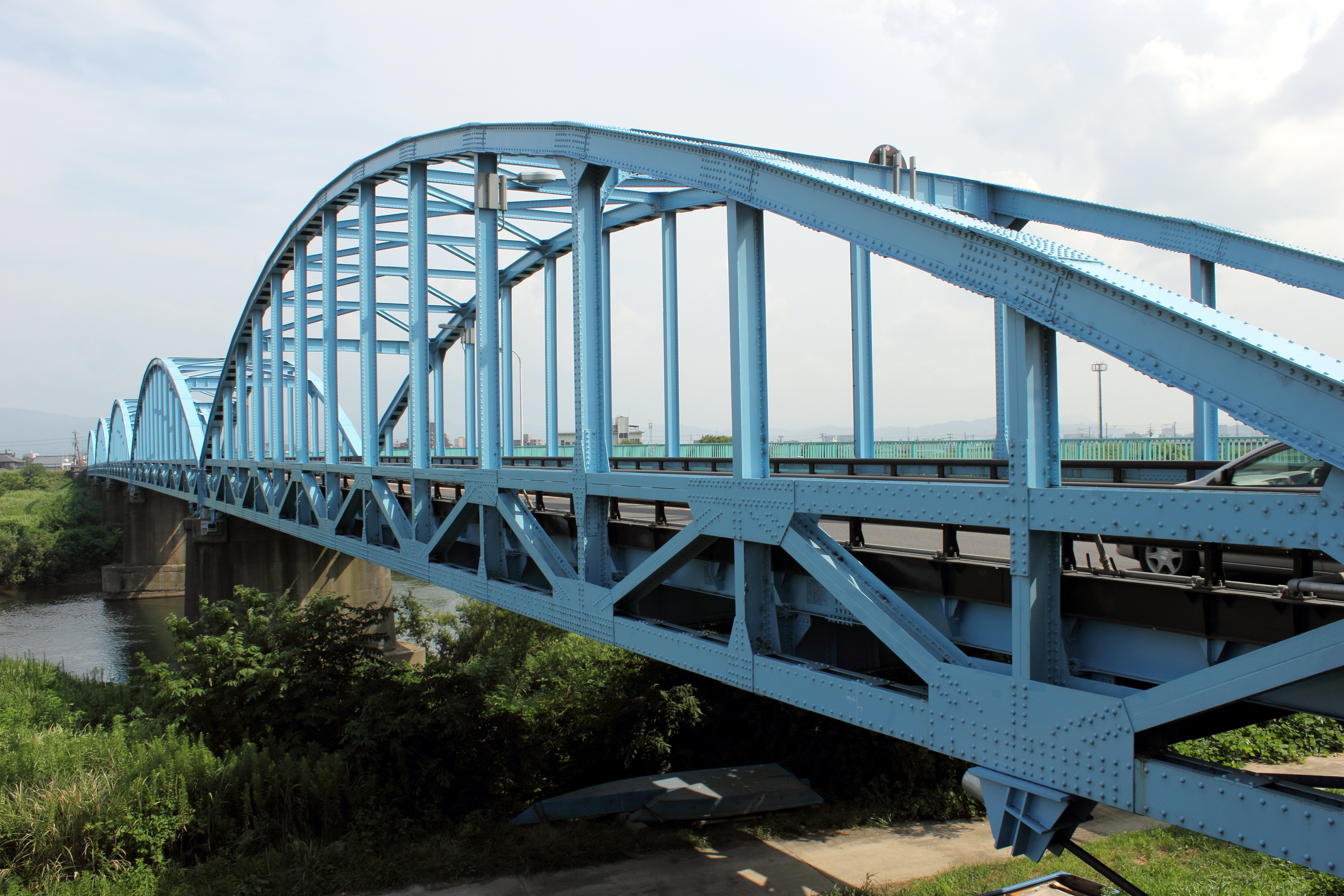 九頭竜川にかかる九頭竜橋